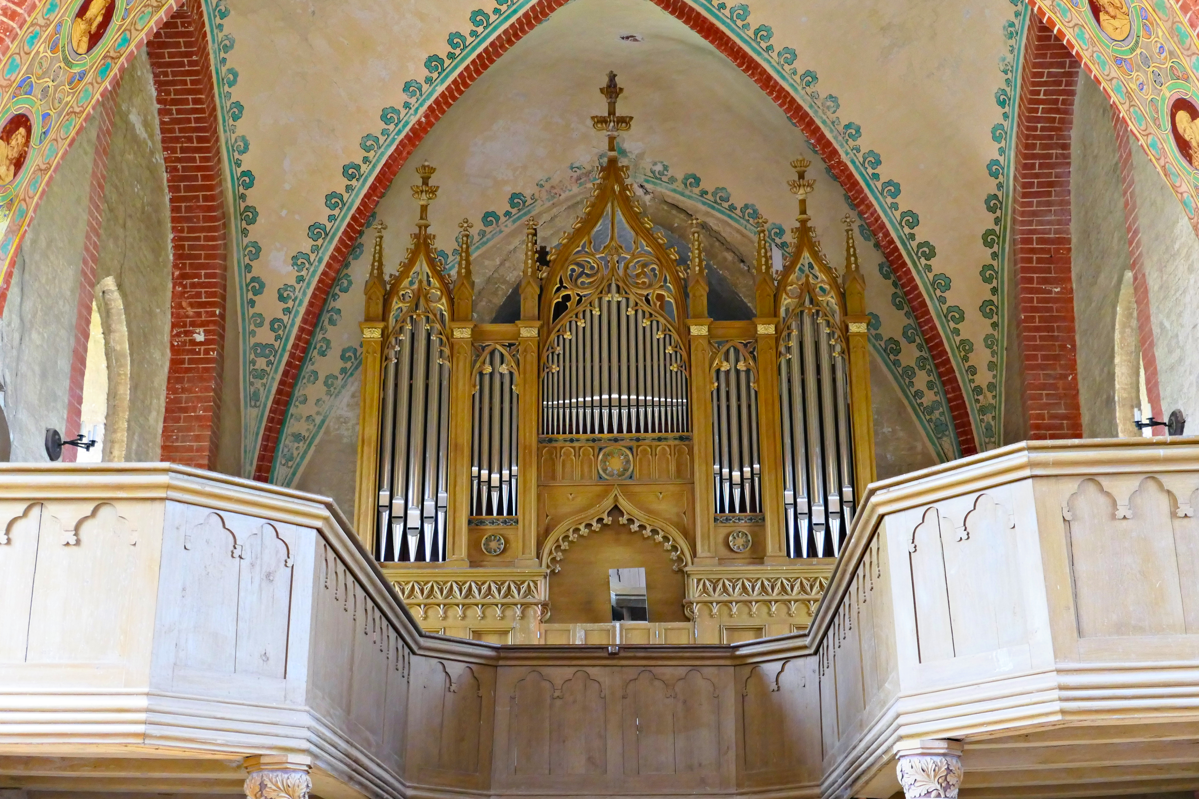 Orgel in Hohenkirchen, Landkreis Nordwestmecklenburg, Mecklenburg-Vorpommern, Deutschland